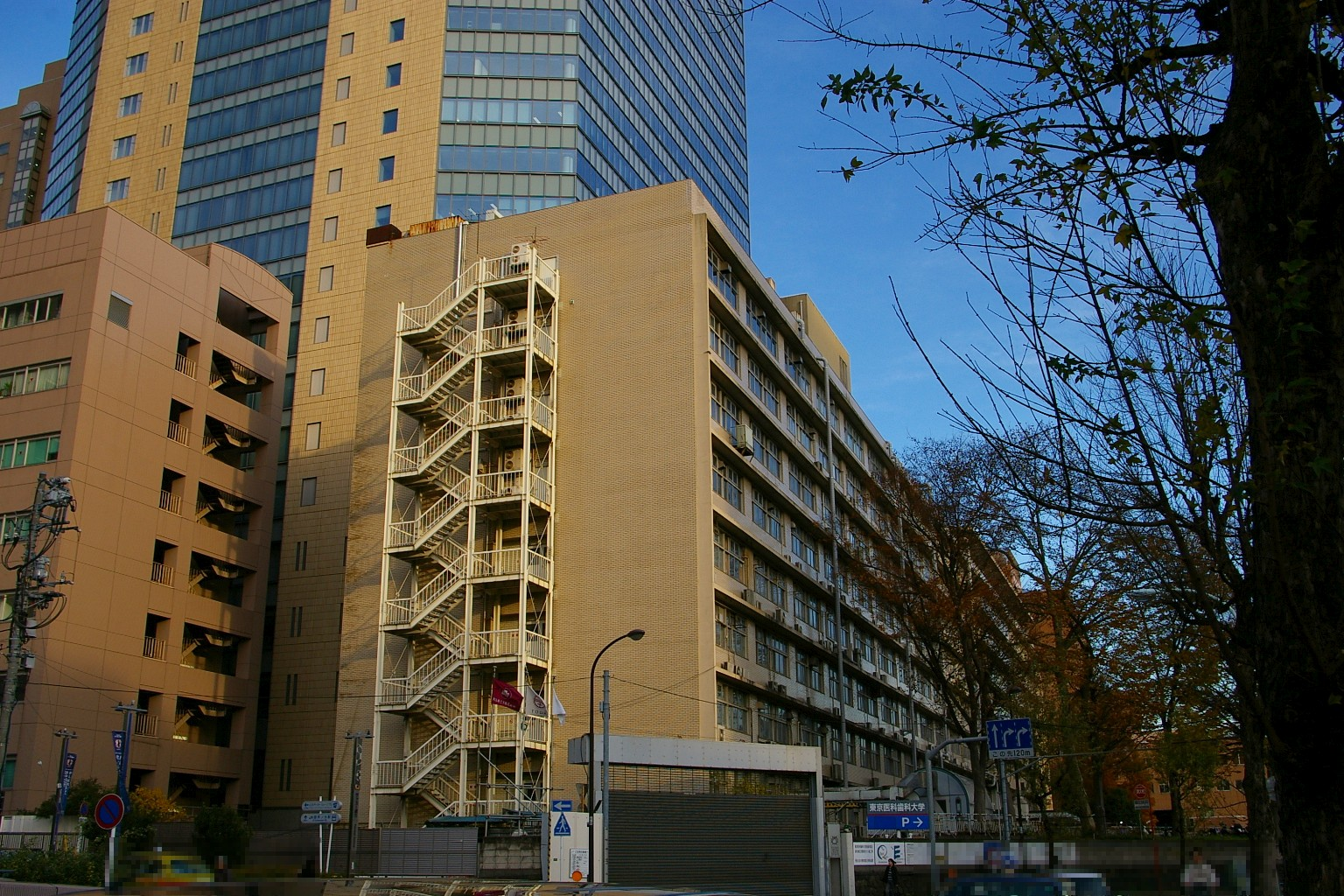 GFDL2009